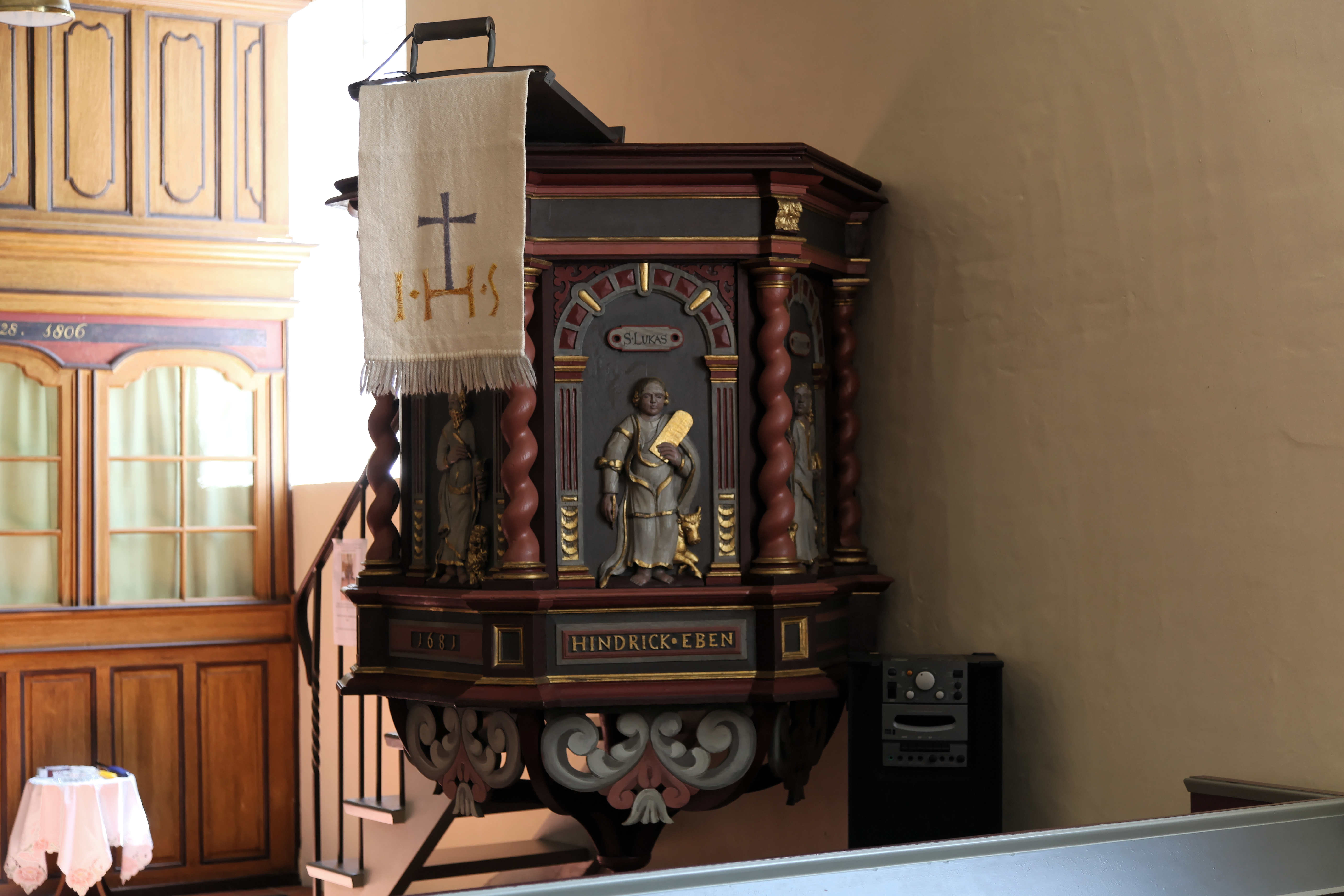 Pogumer Kirche, Kirchring in Pogum, Jemgum